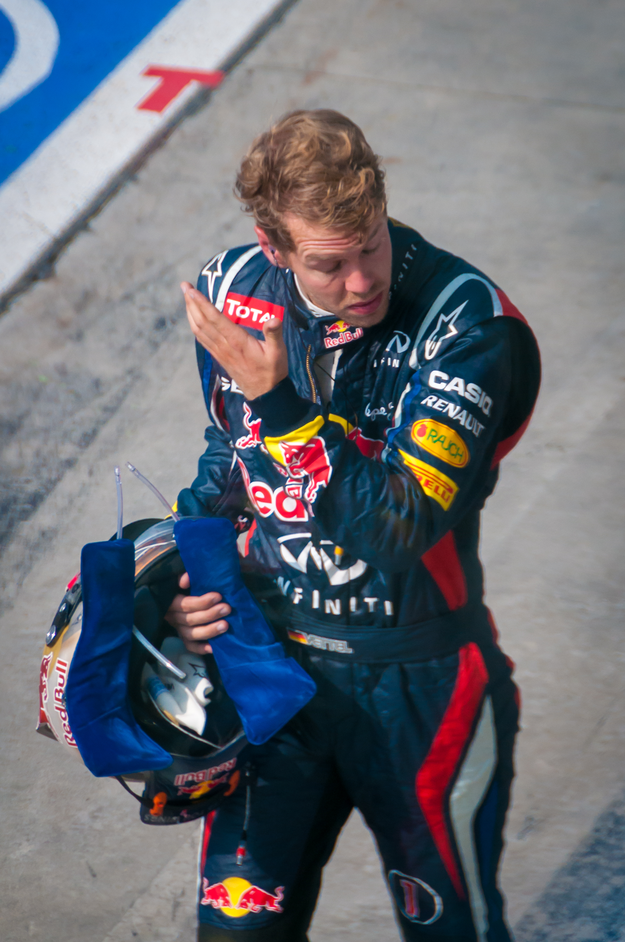 Vettel Monza 2012